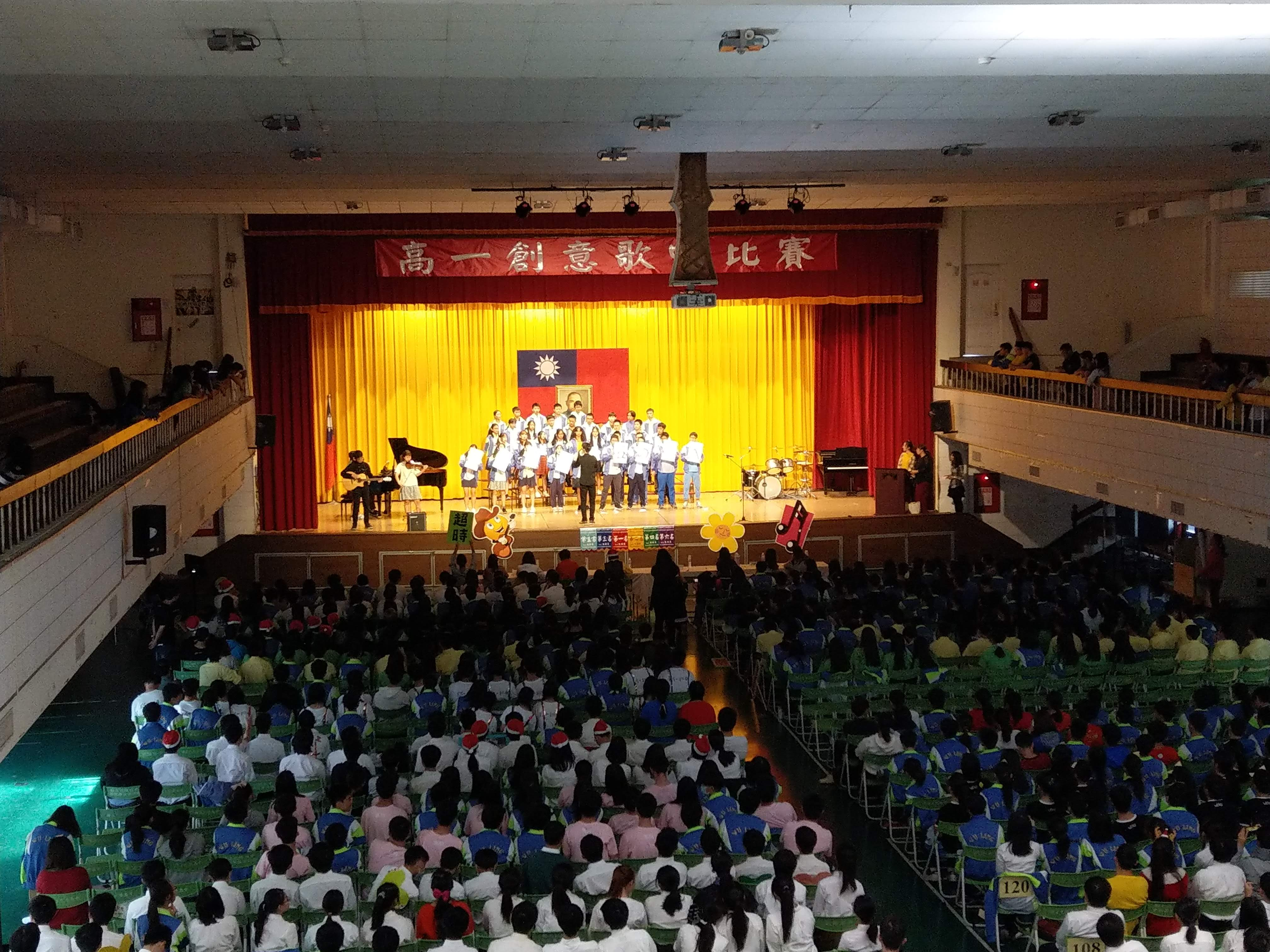 這是台灣武陵高中一年一度的高一歌唱比賽照片。